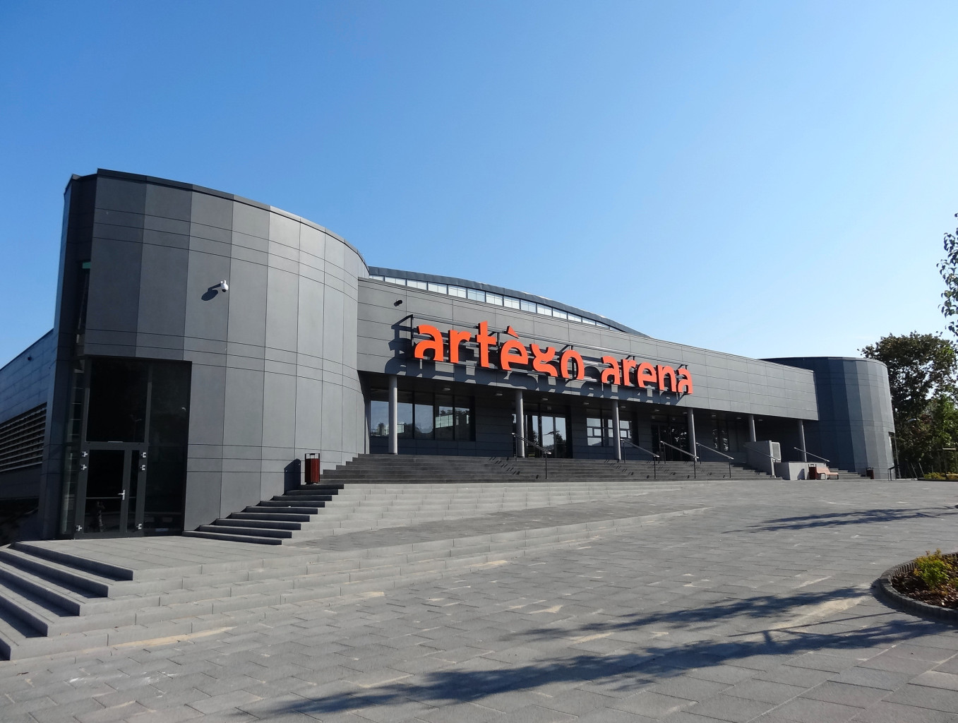 Hala sportowo-widowiskowa Artego Arena w Bydgoszczy przy ul. Toruńskiej